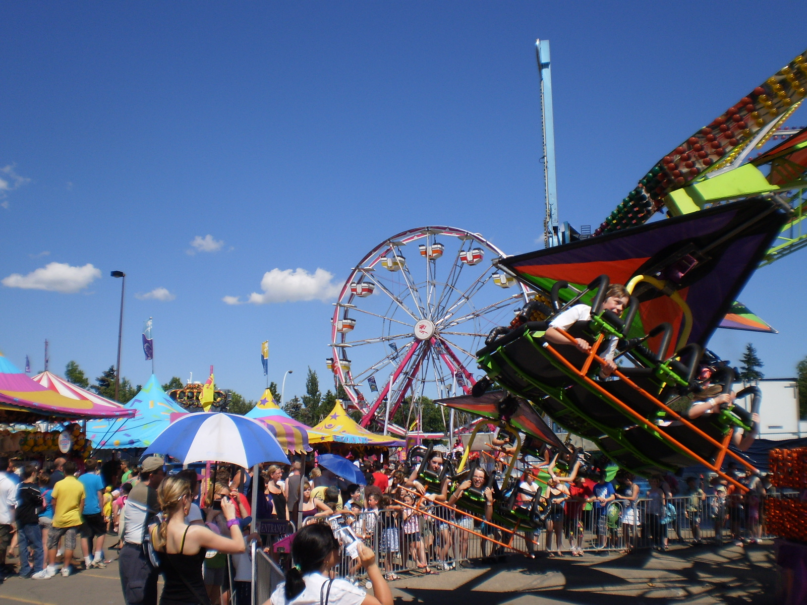 2010 Capital Ex in Edmonton